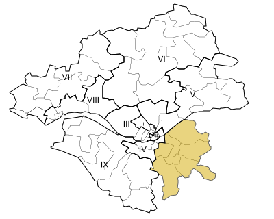 Carte de la dixième circonscription de la Loire-Atlantique